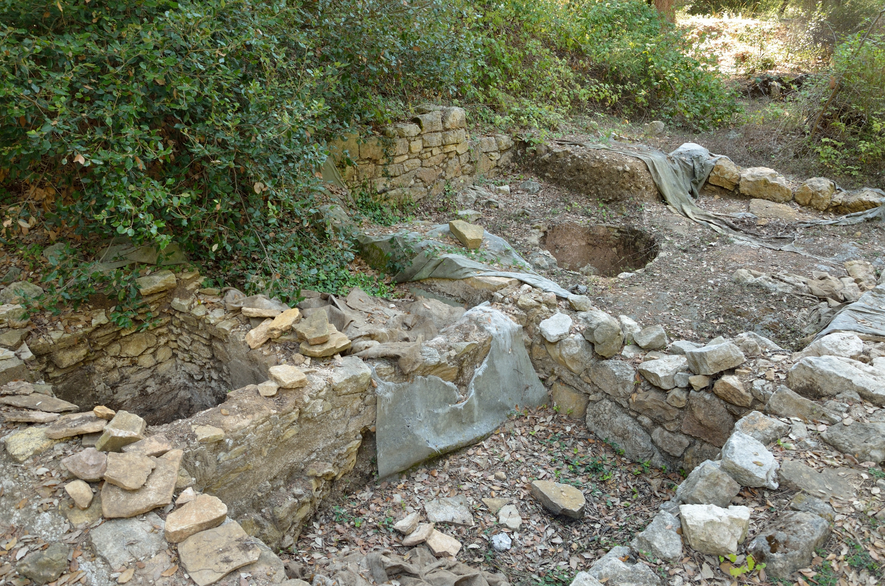 Site des fouilles archéologiques sur l'oppidum des Encourdoules (cité antique de Cordula), à Vallauris (Alpes-Maritimes) .